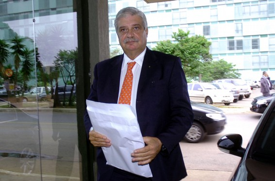 Ministro do Desenvolvimento, Indústria e Comércio Exterior, Miguel Jorge, chega ao ministério para participar da reunião da Câmara de Comércio Exterior (Coméx).